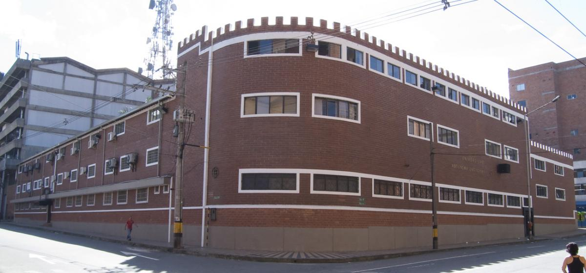 UNAULA sede administrativa